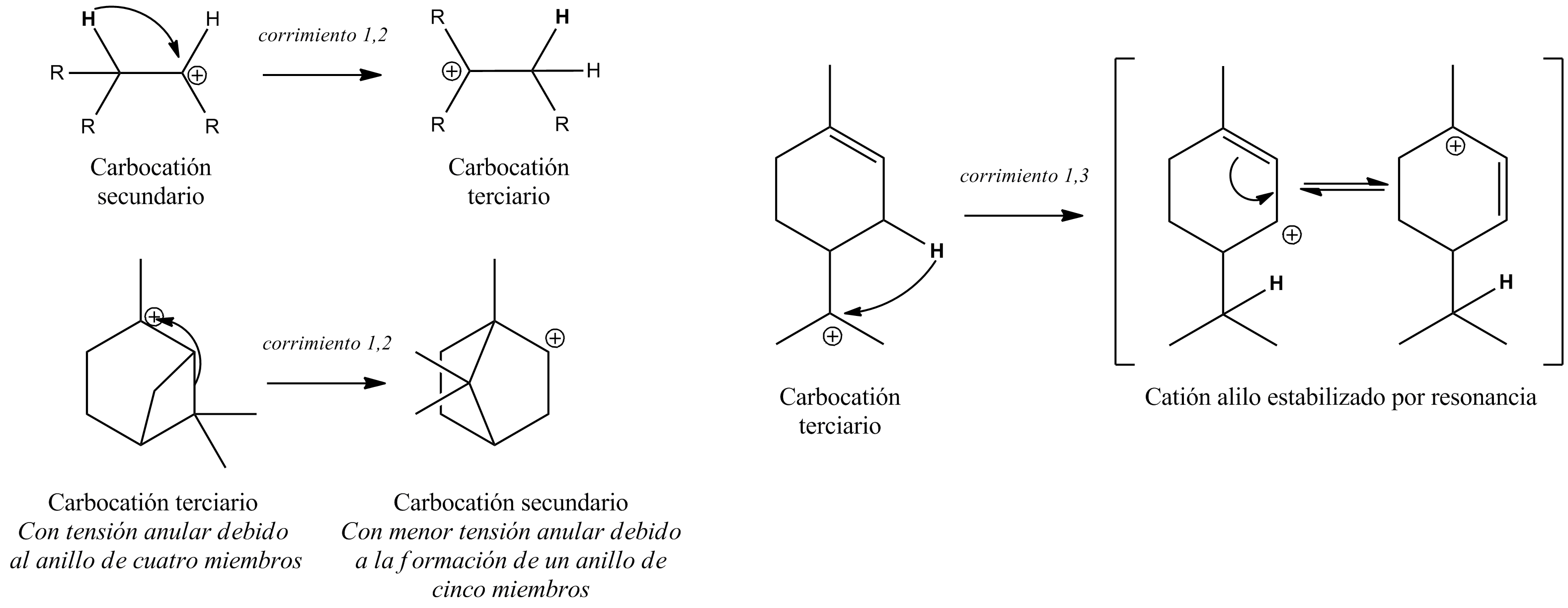 Rearreglo de Wagner-Meerwein